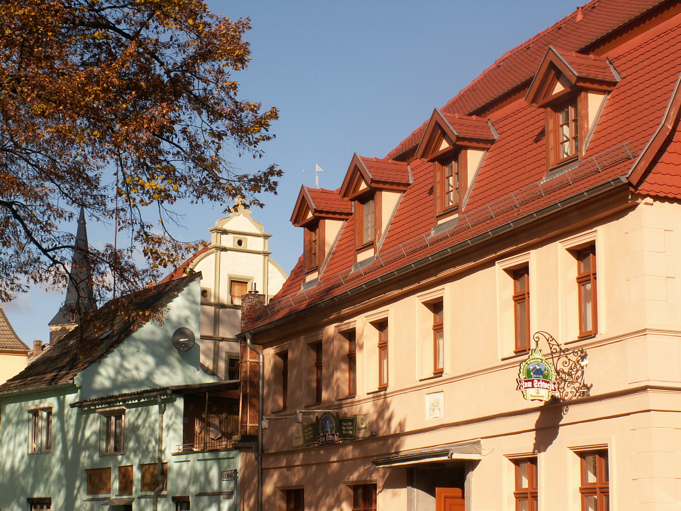 Gaststube "Zum Schwejk" in der Altstadt von Aschersleben